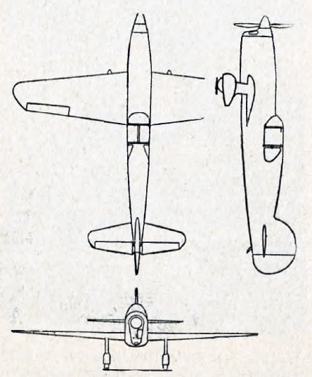 Rzuty samolotu Caudron C.690